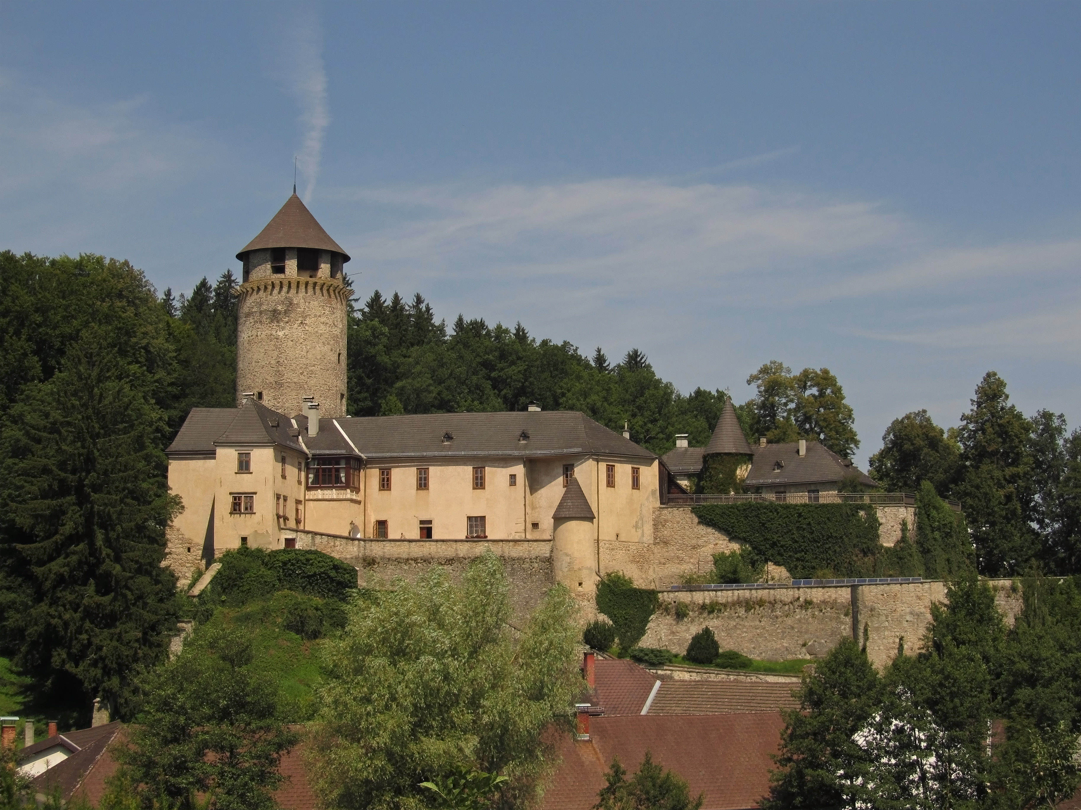 Die gotische Spornburg wurde bis ins 18. Jahrhundert mehrfach umgebaut. Nachdem sie im 19. Jahrhundert zerfiel, wurde sie von 1888 bis ungefähr 1910 wieder aufgebaut.